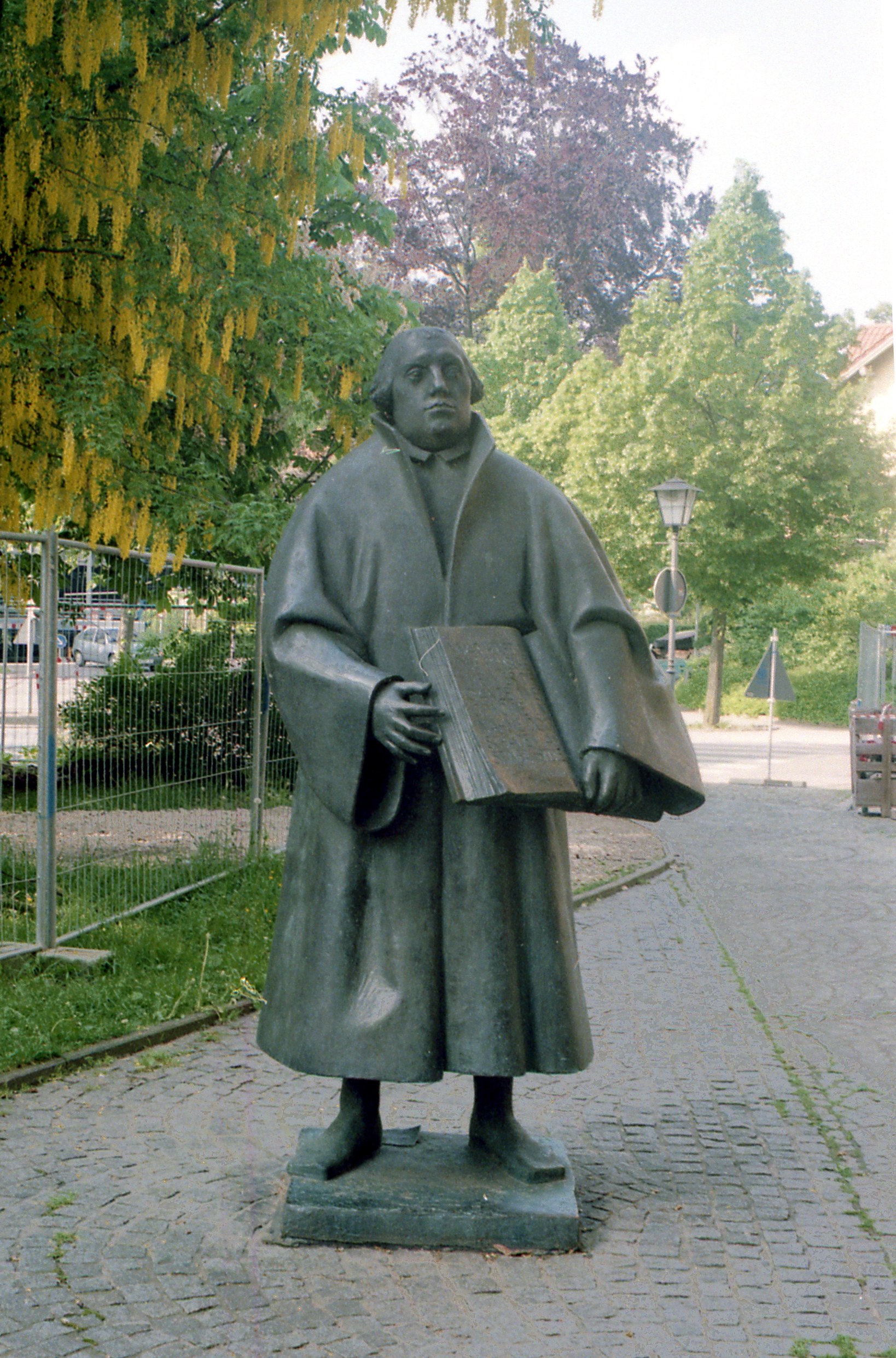 Статуя Лютера в Вайсенбурге